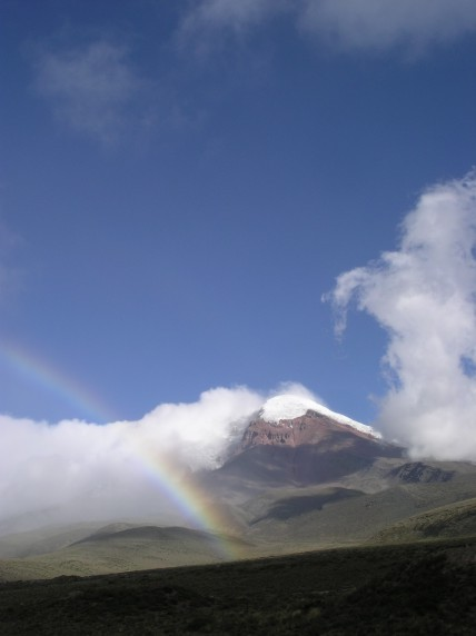 Der Chimborazo von Nordwesten, aufgenommen im Juli 2004 von der Straße zwischen Ambato und Guaranda auf etwa 4000 m Höhe. (Chimborazo from North-West, Picture taken in July 2004 on road Ambato - Guaranda at an altitude of ~4.000 m) Fotografiert von André Hübner, zur Veröffentlichung unter GNU FDL freigegeben gegenüber Mazbln